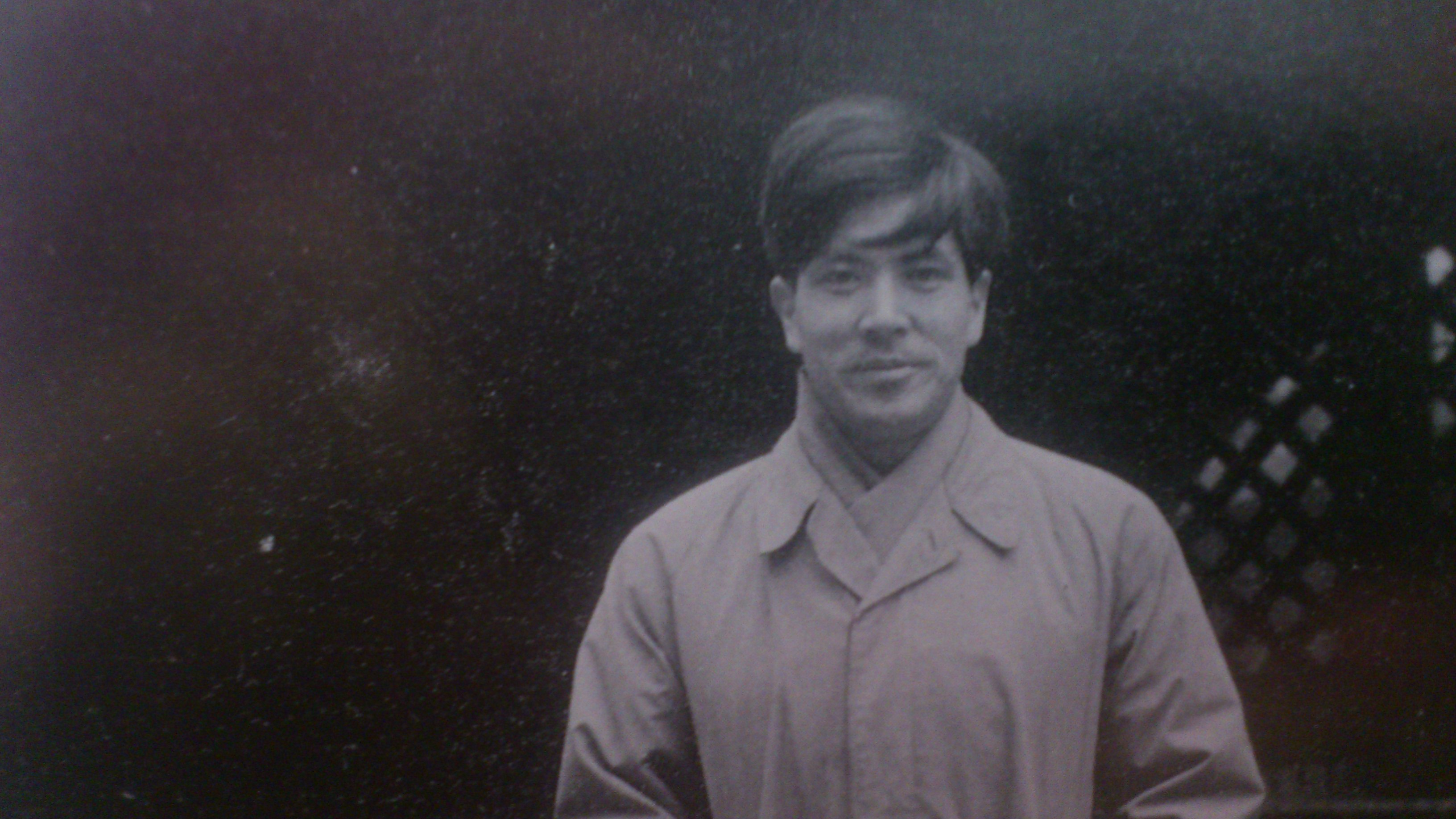 小川国夫 1956年、ロンドンにて